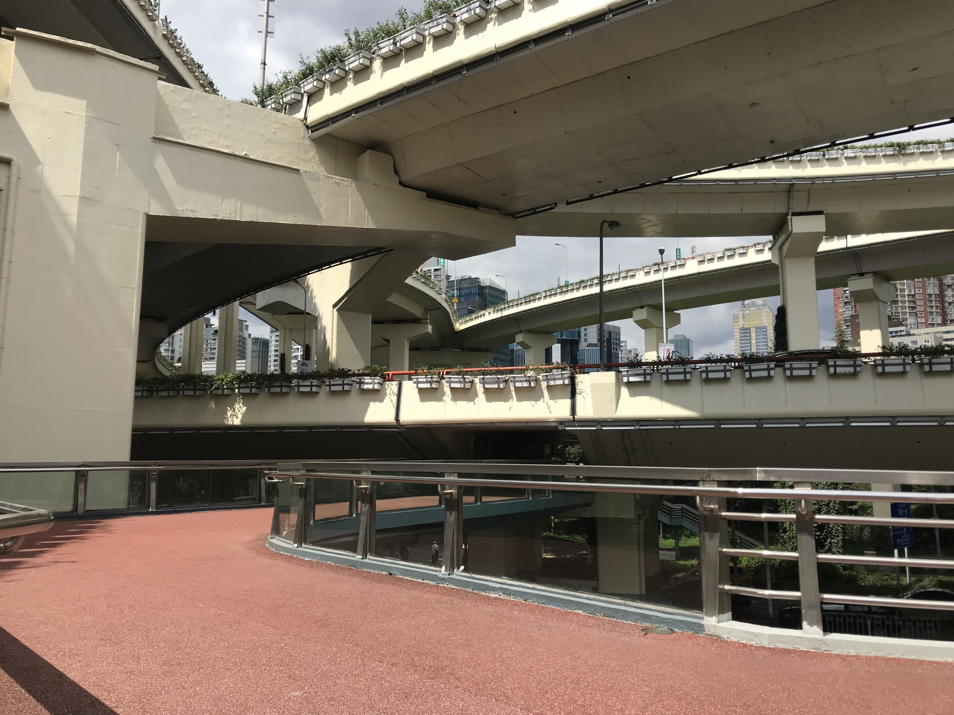 延安高架路と南北高架路の立体交差